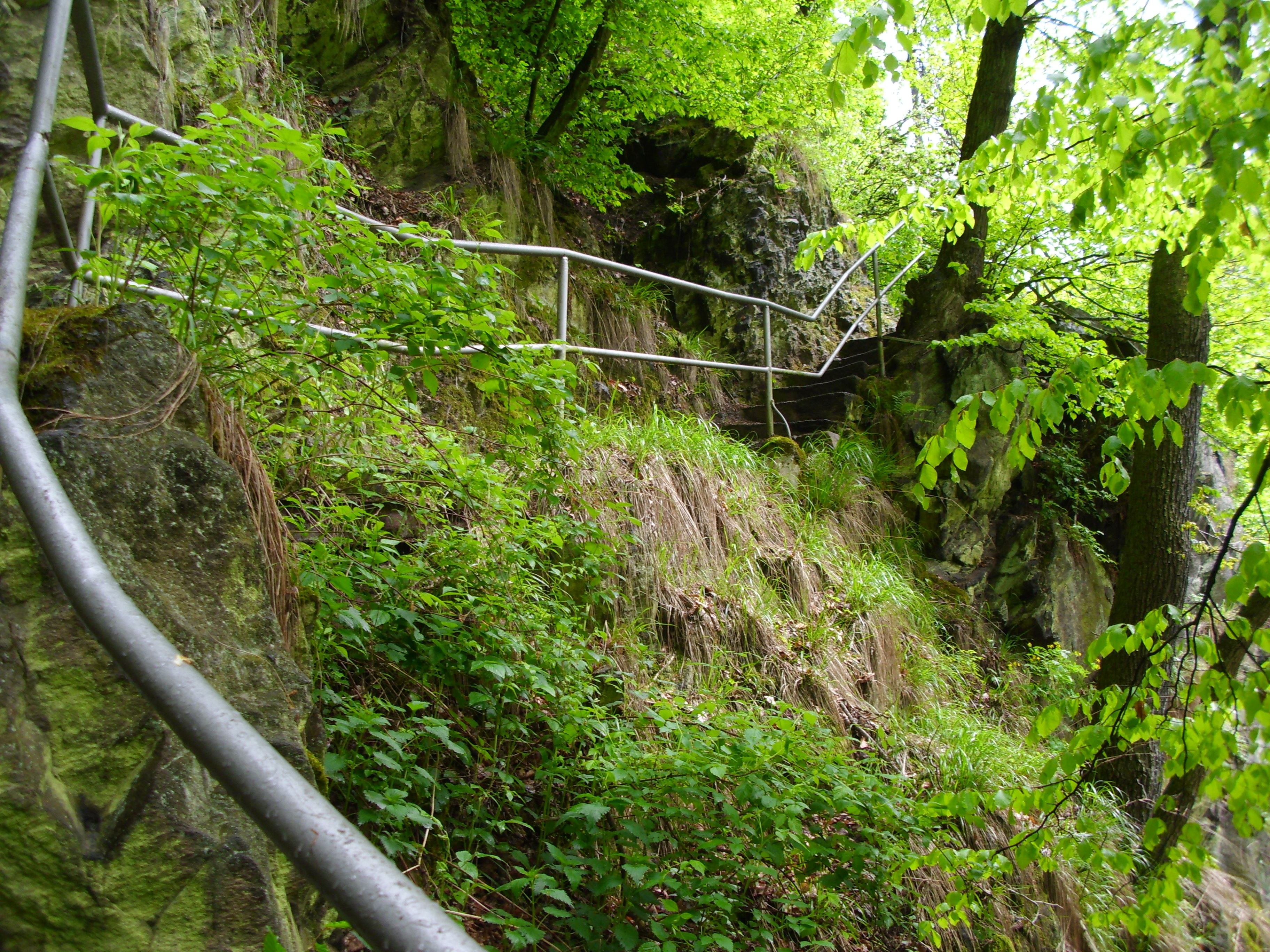 Der Teppenaufgang von Rabenau überquert das Rabenauer Mühlenwehr.